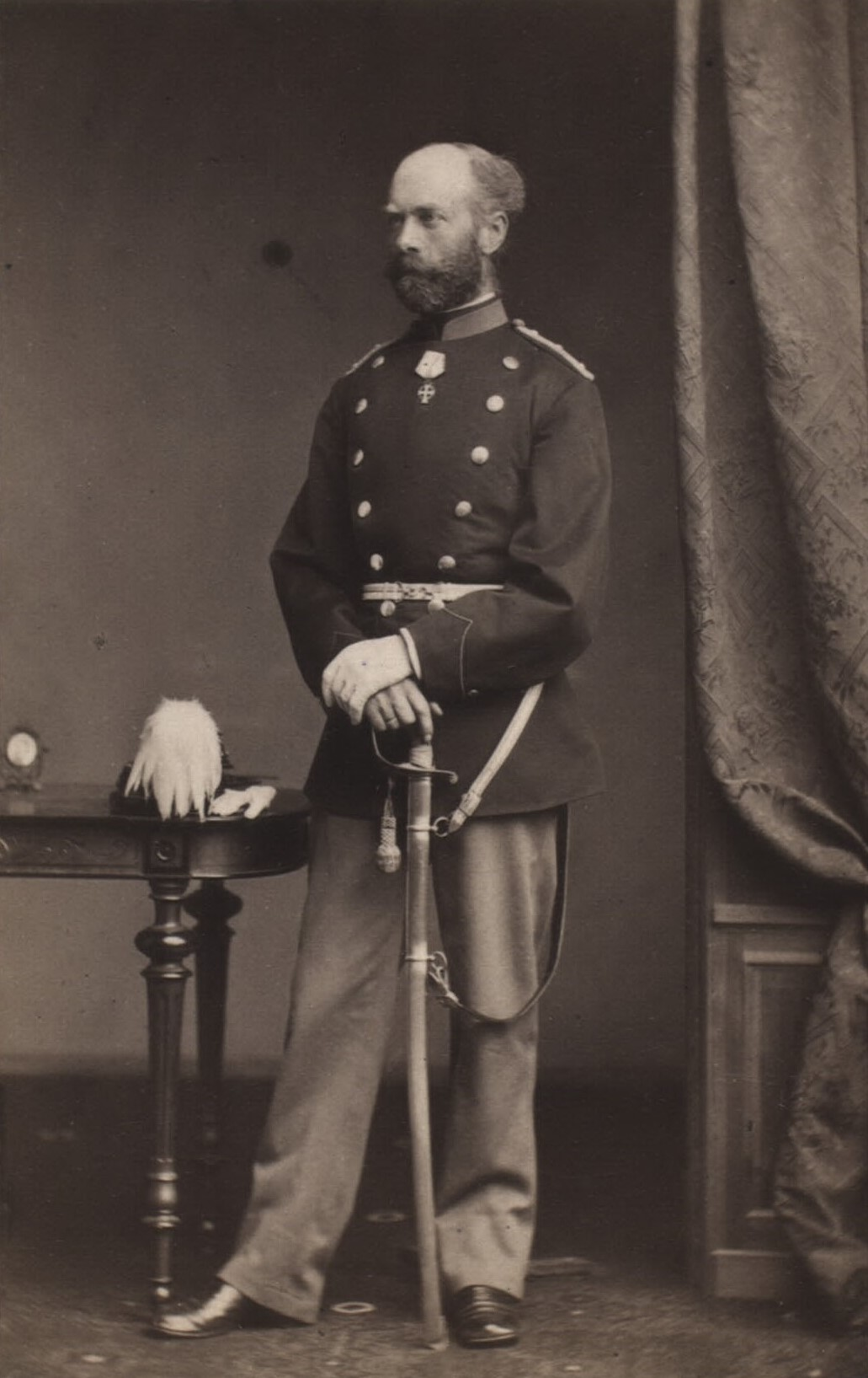 Bærent Bærentsen (Bærentzen) (1825–1896), oberstløjtnant og folketingsmand fra Færøerne.